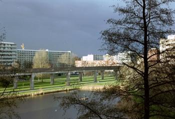 De Bijlmermeer: hoogbouw, metrobaan en veel groen. .